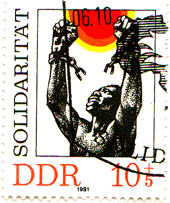 Solidarität, Am 21.11.2004 von Richard Seefeld selbst gescannte Briefmarke der DDR